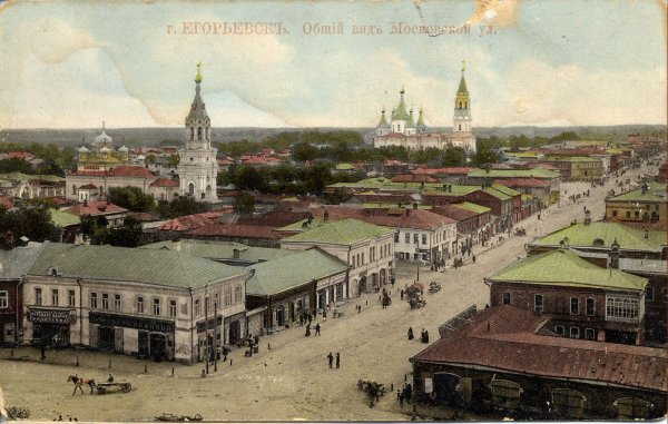 Егорьевск на дореволюционных открытках